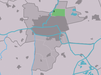 Kaartsje fan himrik fan Lekkum